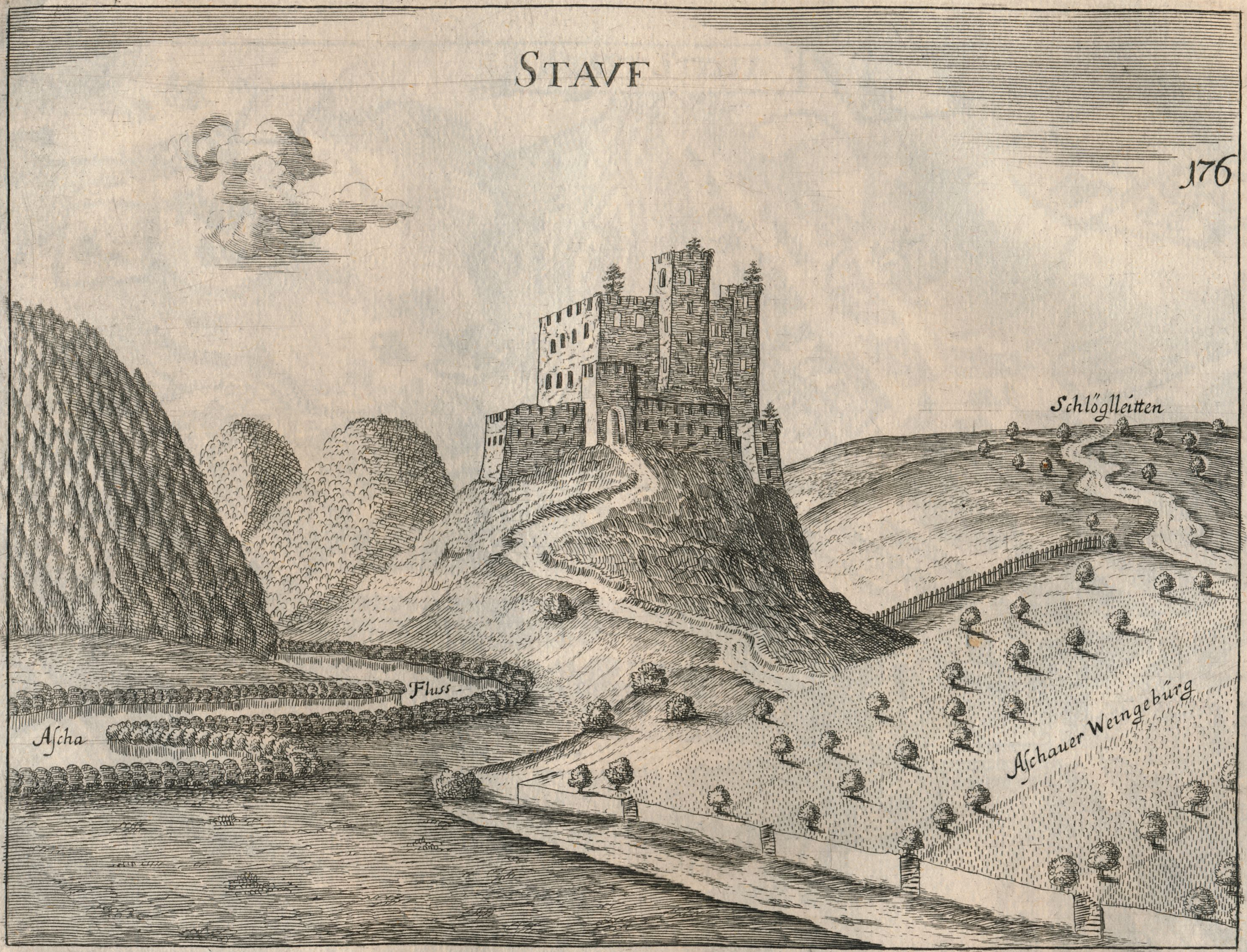 Stich der Burgruine Stauf in Oberösterreich aus Topographia Austriae superioris modernae